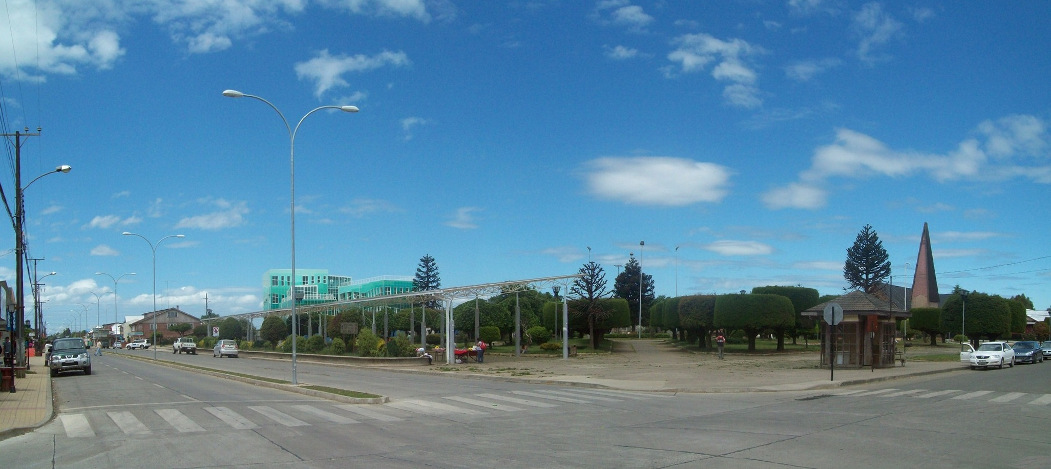 plaza de fresia diciembre 2011